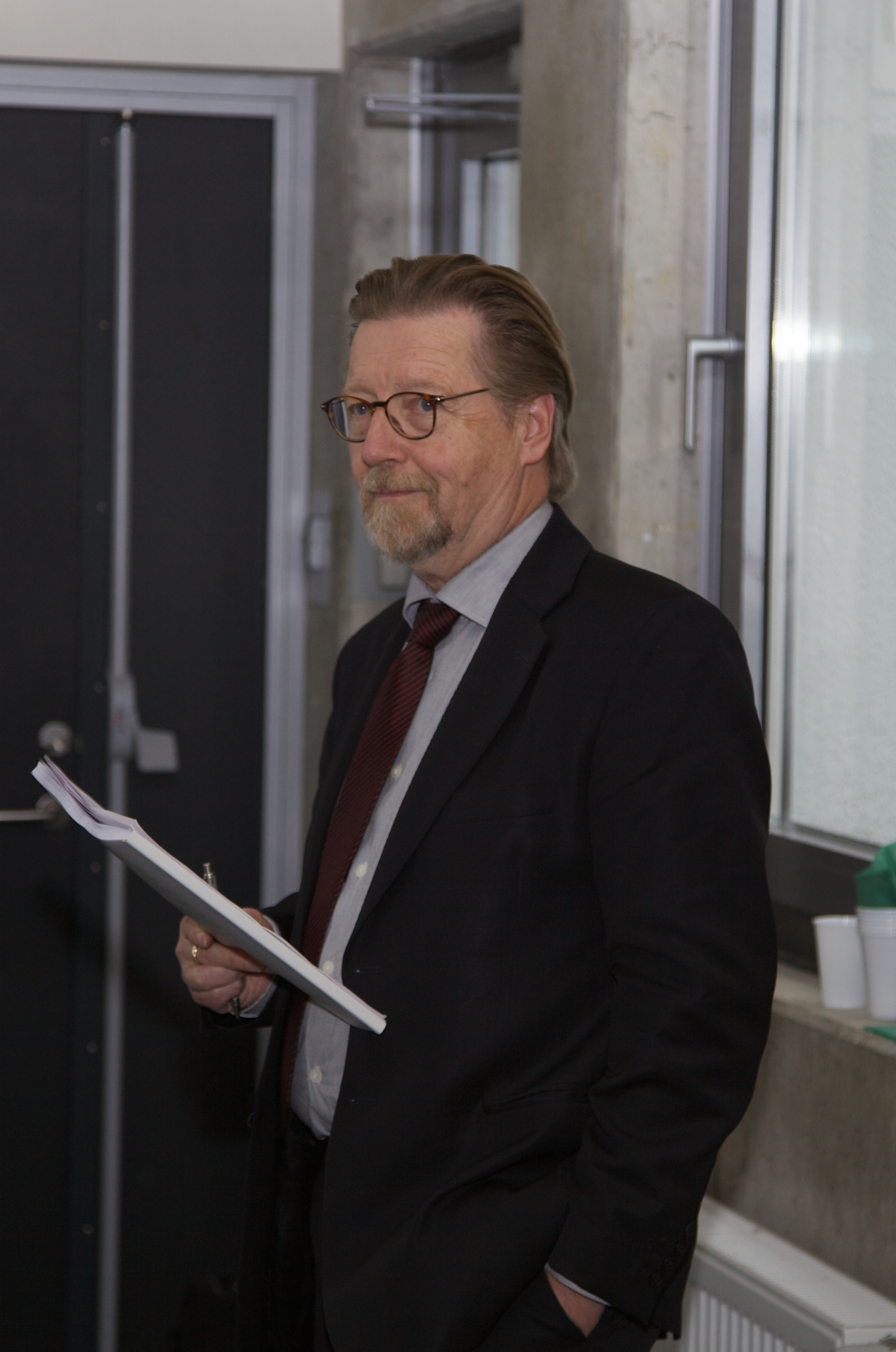 Erno Lehtinen, suomalainen kasvatustieteilijä